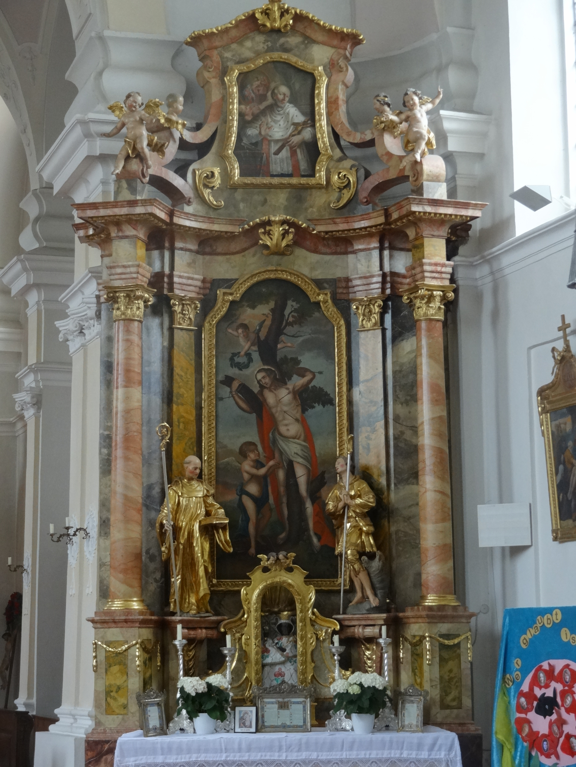 Rechter Seitenaltar der Pfarrkirche St. Martin in Langenpreising (Landkreis Erding, Oberbayern)